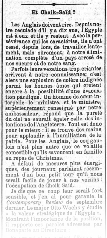 Début d'un article signé A. Béchet publié dans le quotidien L'Univers du 7 février 1893. Le journaliste suggère qu'une façon de forcer les Anglais à évacuer l'Égypte, qu'ils occupent depuis 1882, serait d'occuper Cheikh Saïd dans le détroit de Bab-el-Mandeb, au sud de la mer Rouge. Il se base sur un article dans une revue anglaise qui soutient que l'occupation de Cheikh Saïd par une nation rivale mettrait en péril le contrôle britannique de l'Égypte.